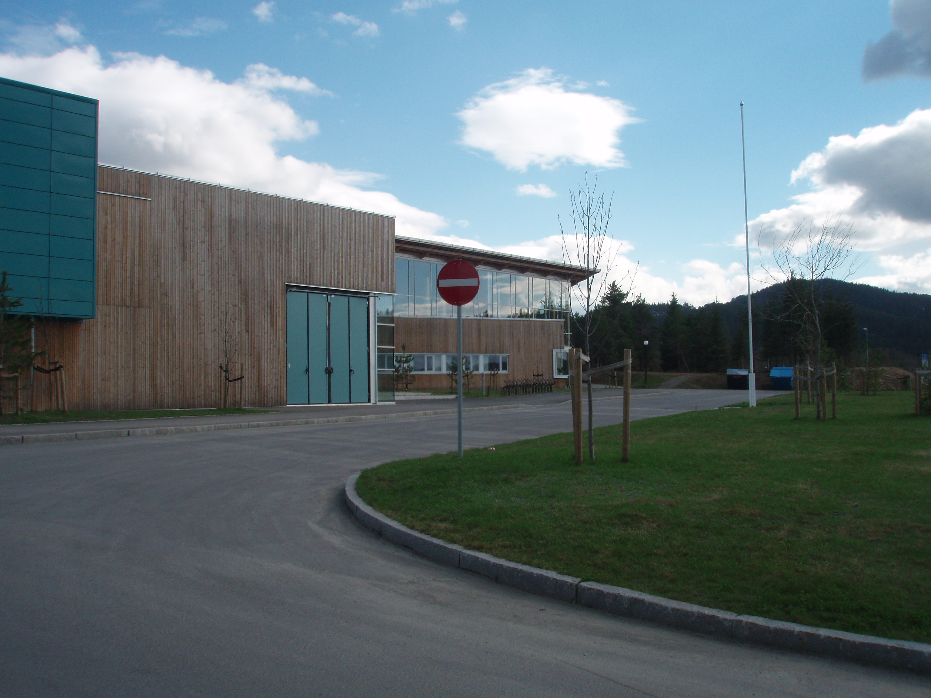 Fasaden til Brekkåsen skole, og innkjøringen. Parkeringsplassen ligger til venstre for bildet. veien der det står et innkjøring forbudt-skilt starter i den andre enden, til høyre for søppelcontainerne